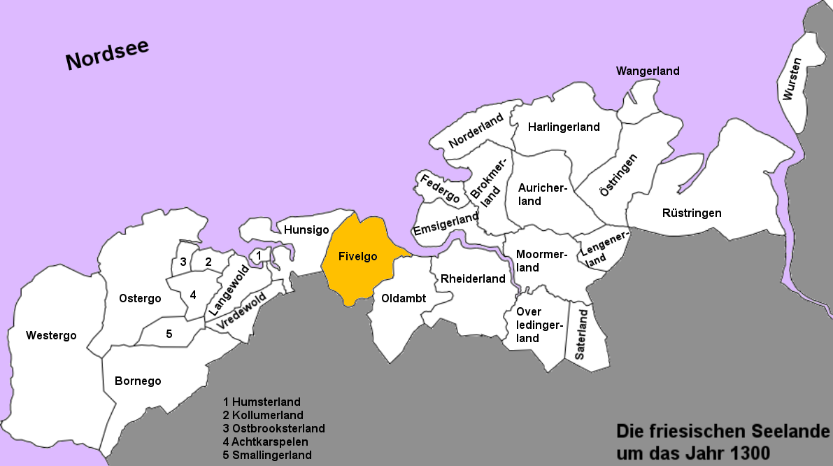 Karte der freien friesischen Seelande (Landesgemeinden) von der Zuiderzee bis zur Weser in den Grenzen um das Jahr 1300, der Fivelgo hervorgehoben. (Karte ohne Inseln.)